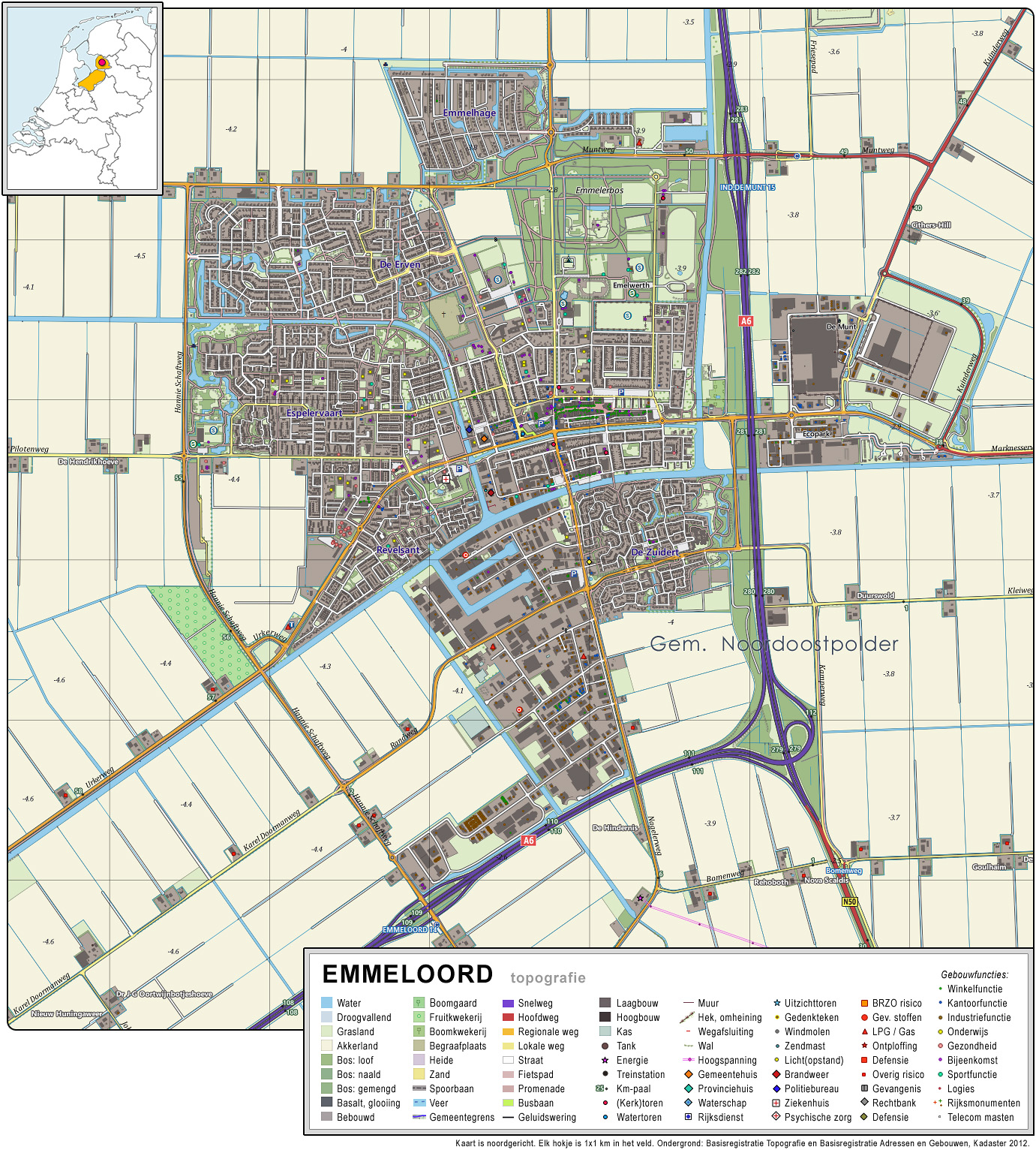 Topografisch beeld van de stad Emmeloord. Op basis van de GML open geodata van de BRT/Top10NL (basisregistratie Topografie, Kadaster 2012), vrijgegeven door Kadaster op 30-11-2012 onder de Creative Commons BY licentie. Gebouwvlakken vanuit Open Geodata BAG extract (december 2012). Samenstelling en kleurenschema: Jan-Willem van Aalst, met QuantumGIS en Photoshop.